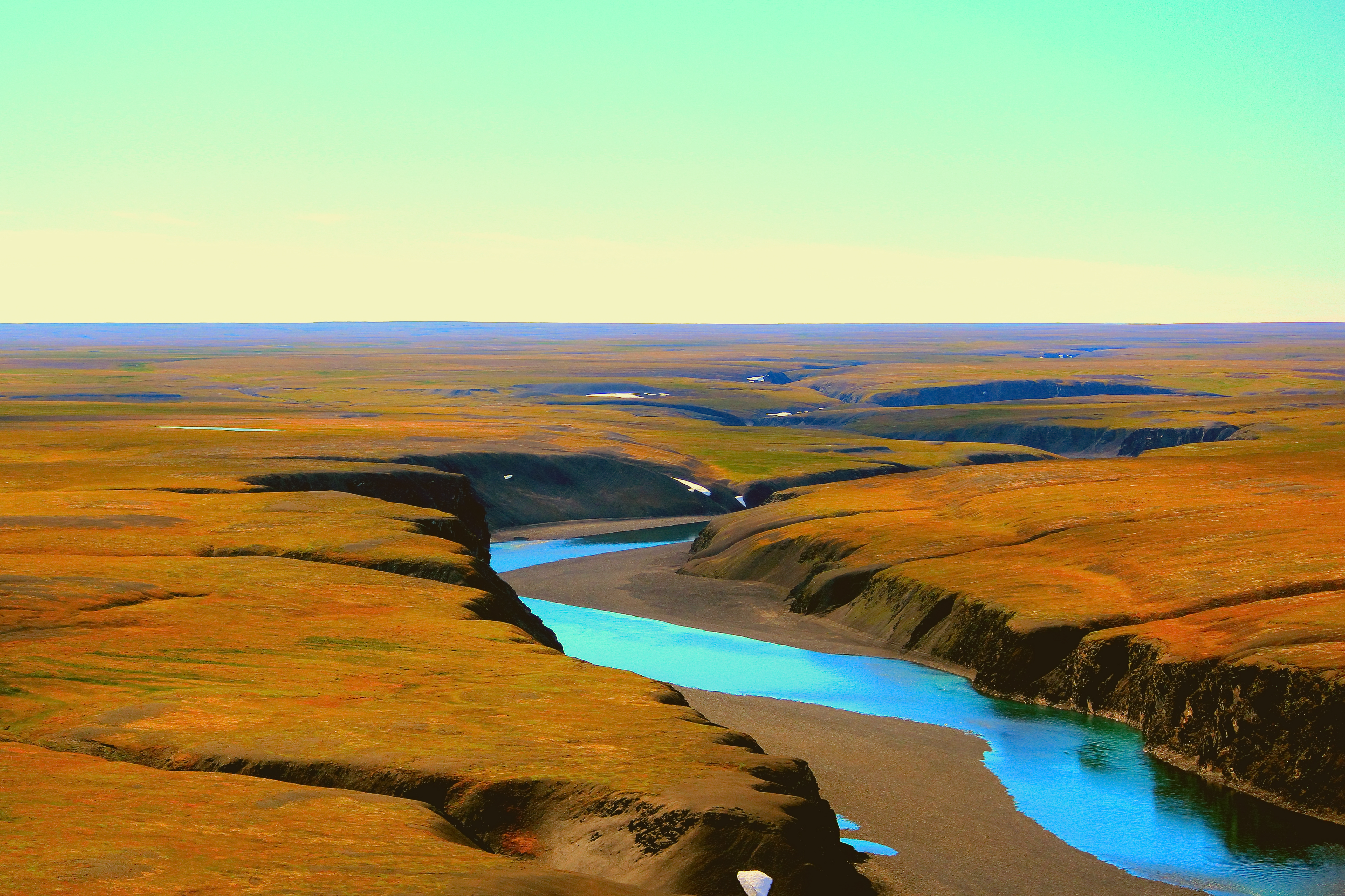 Национальный парк Русская Арктика, Новая Земля This image is related to the protected area of Russia number 2900112